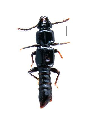 Plastus biconcavus (scale bar = 1 mm)